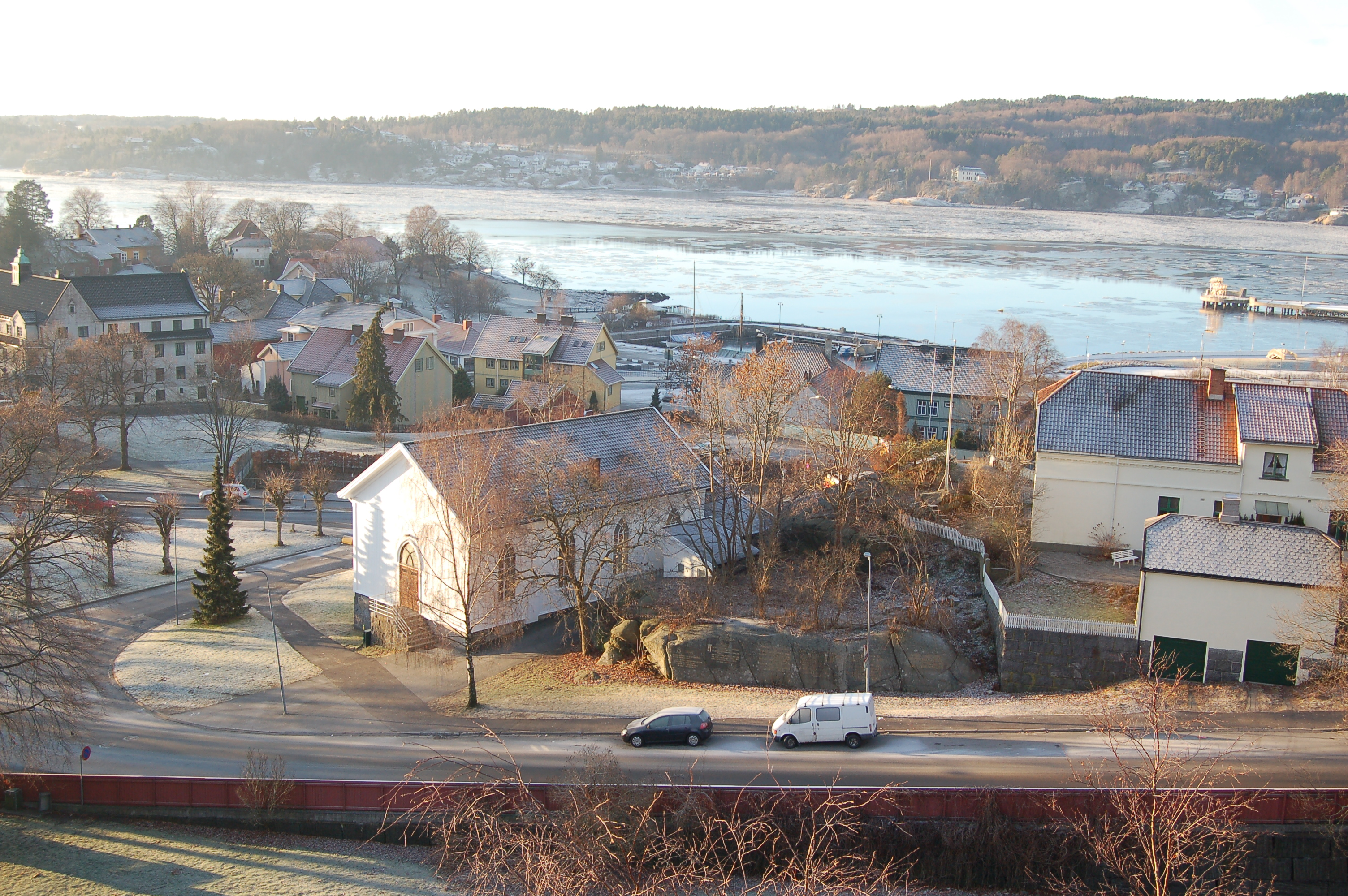 Nederst i Herregårdsbakken i Larvik - bedehuset i bildet.